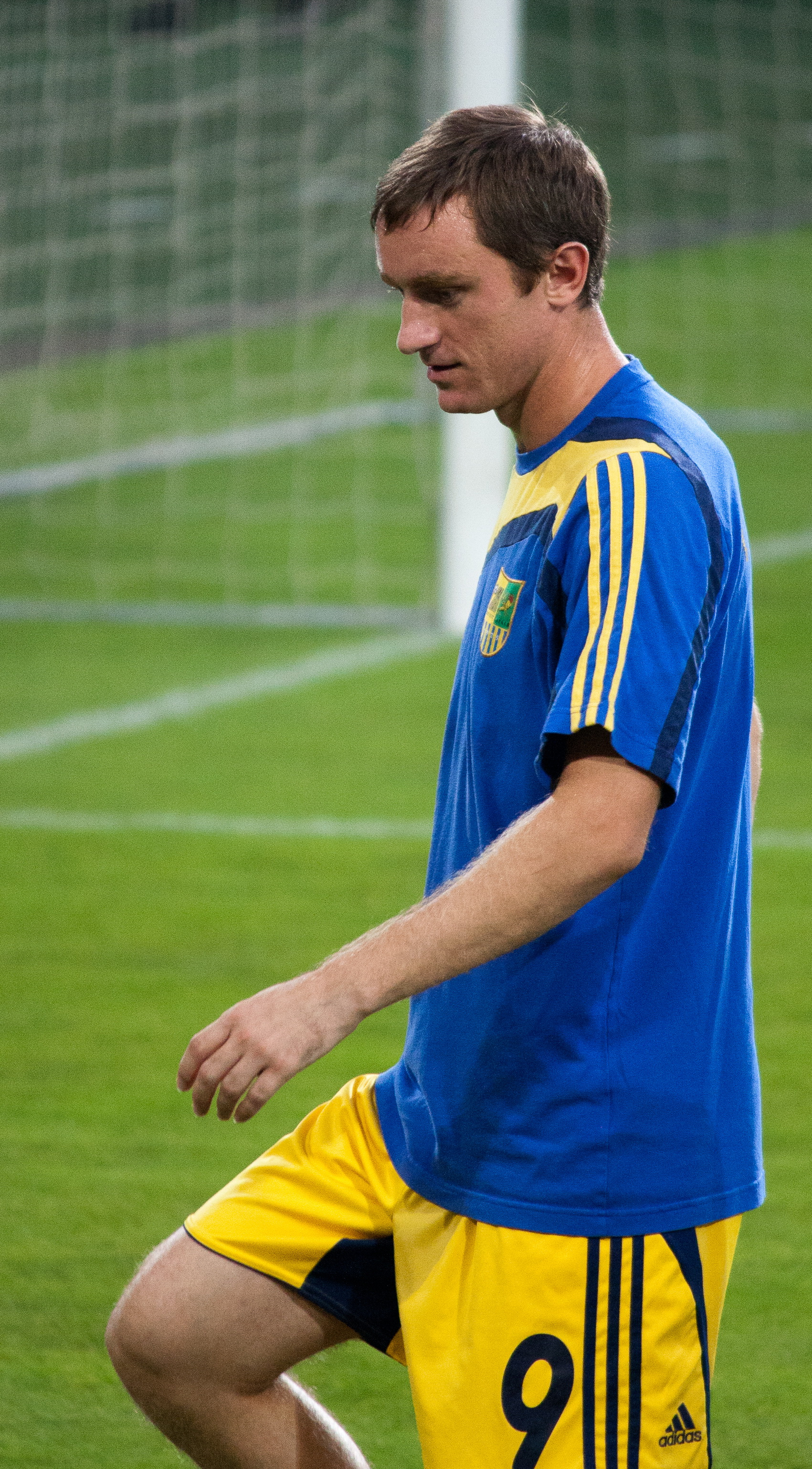 Перед матчем Днепр-Металлист